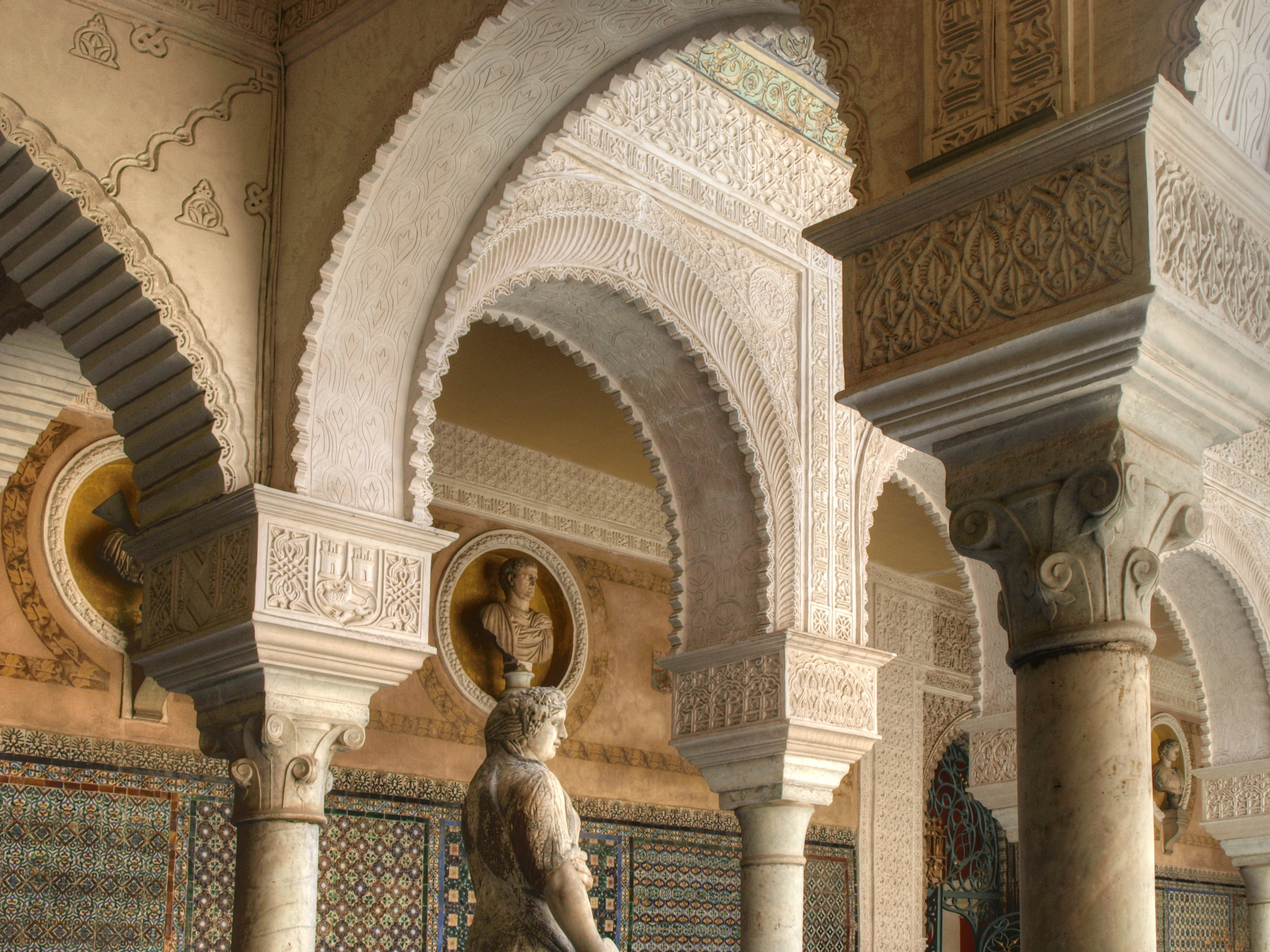 Casa de Pilatos